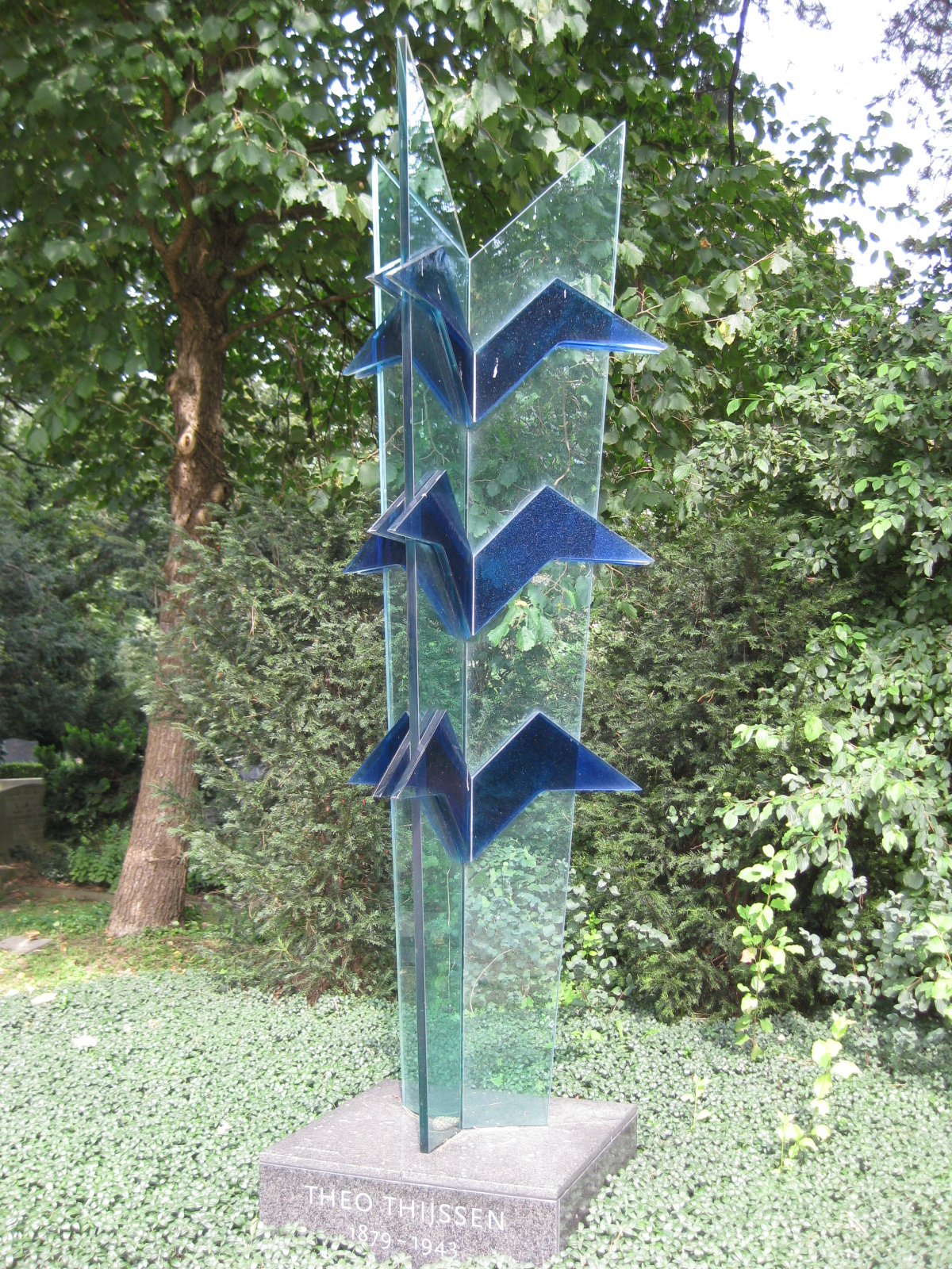 Theo Thijssenmonument op begraafplaats De Nieuwe Ooster in Amsterdam, ontworpen door Jan Wolkers en onthuld op 16 juni 2005